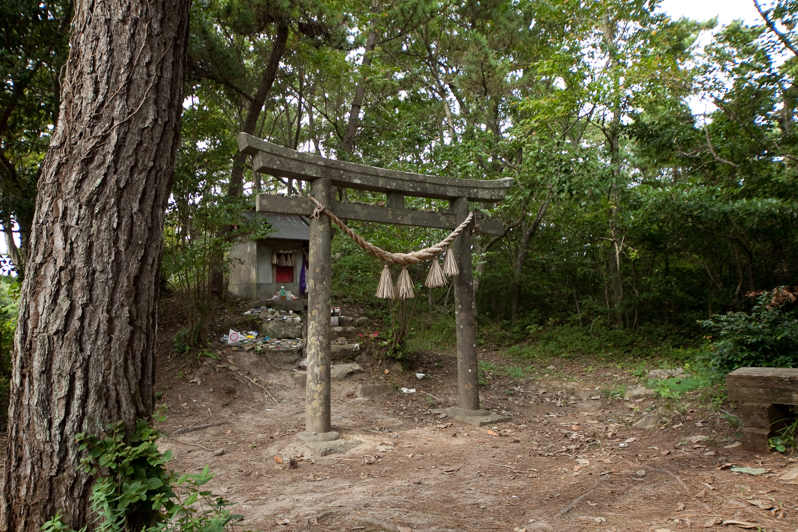 宮城県の田代島にある猫神社